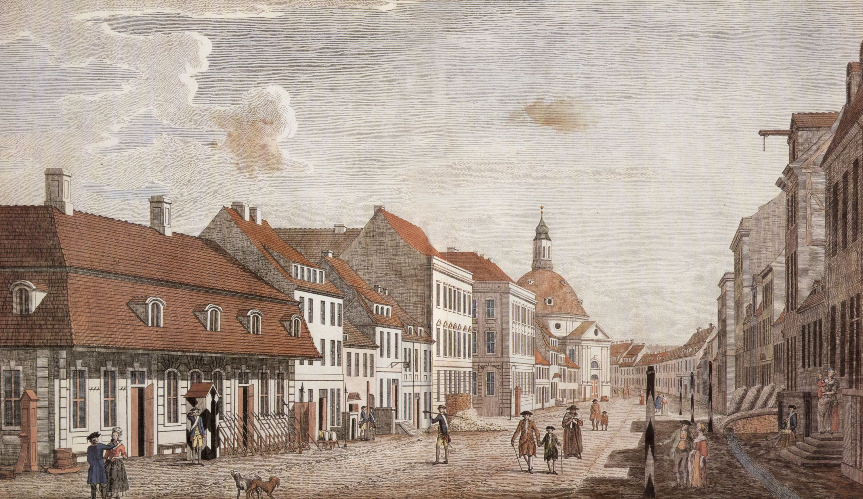 Berlin: Mauerstraße mit Böhmischer Kirche (Betlehemskirche), 40,1 × 66,6 cm, Kupferstich, koloriert